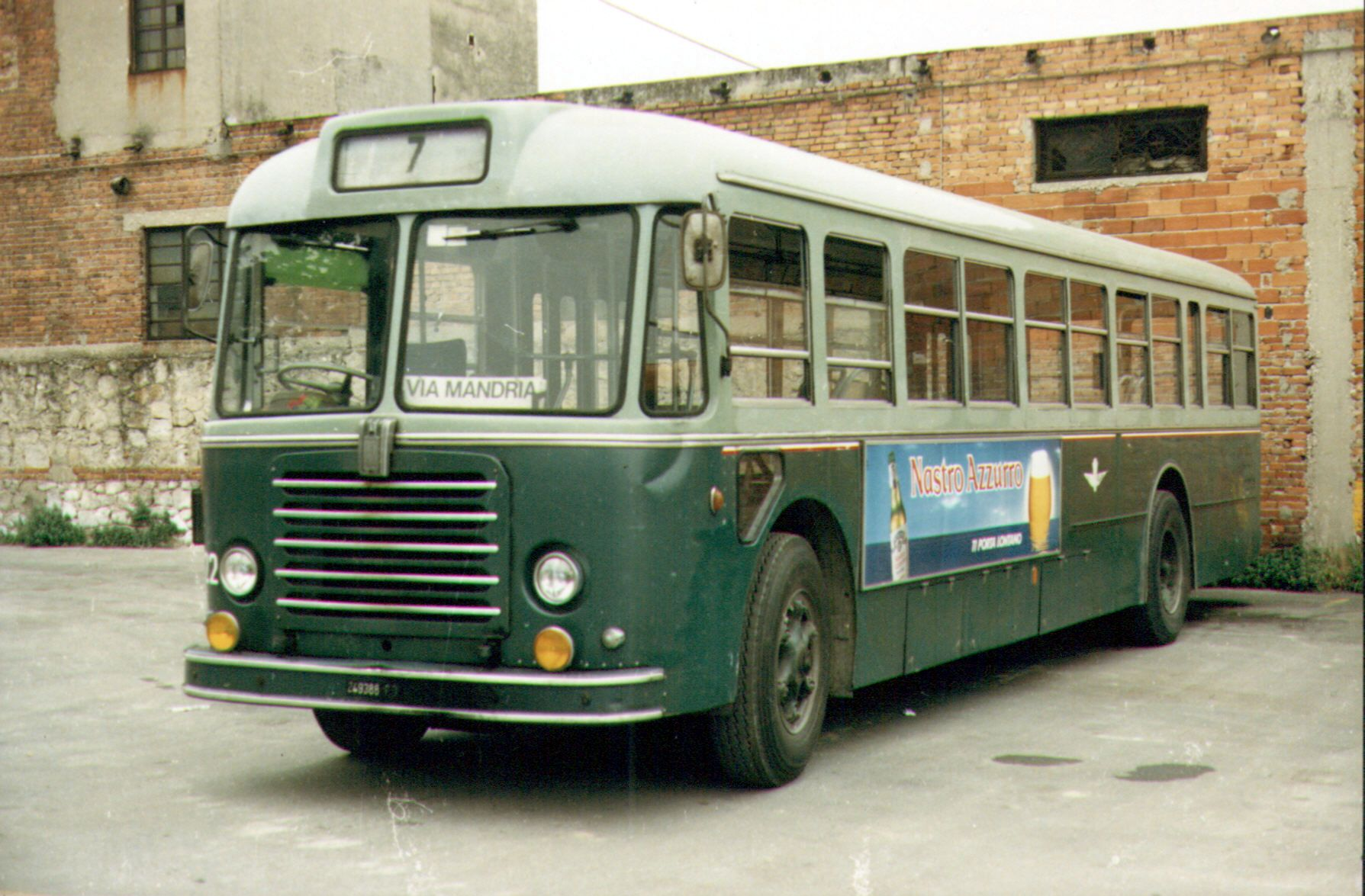 00555-Fiat 411.UM Cansa, matricola 222, a Padova